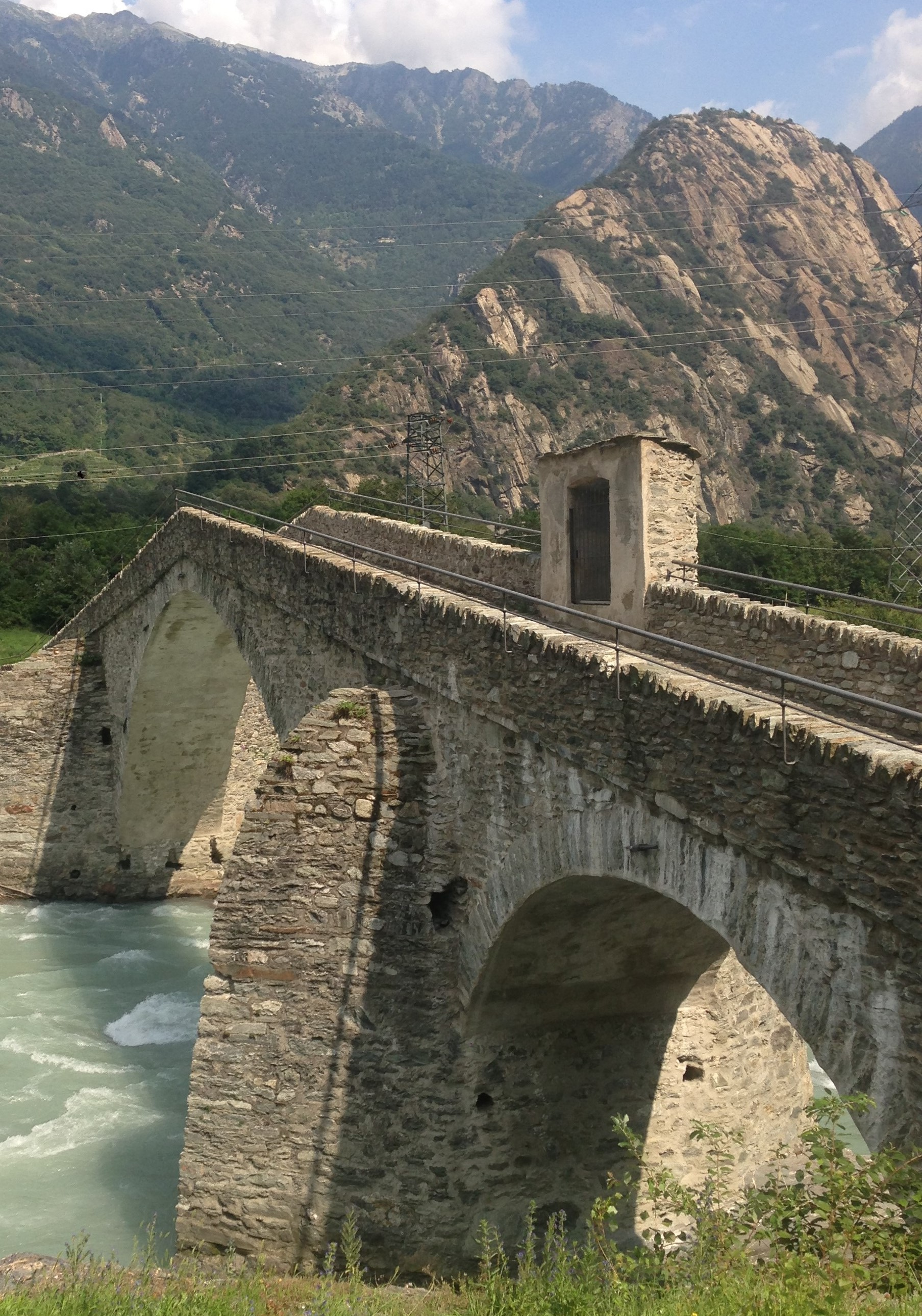 Ponte romano di Echallod (Arnad, Valle d'Aosta, Italia). Sullo sfondo, la Courma di Machaby.